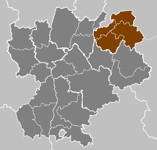 Maps of arrondissements and cantons of France: Département de la Haute-Savoie.PNG (Région Rhône-Alpes)